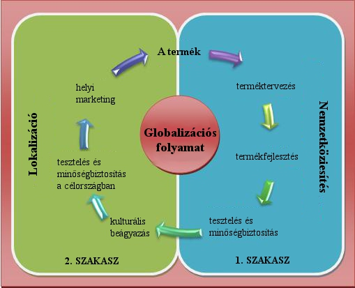 A folyamatábra a globalizáció, internacionalizáció és lokalizáció összefüggéseit mutatja be